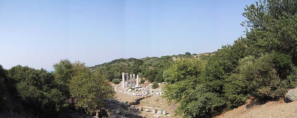 Panoramablick auf das Kabirion in Samothráki